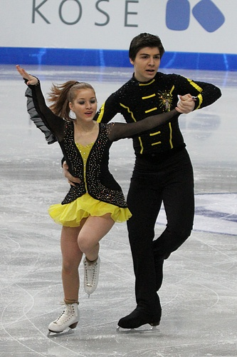 Чагла Демирсал и Берк Акалын (Турция) на чемпионате мира по фигурному катанию среди юниоров 2012